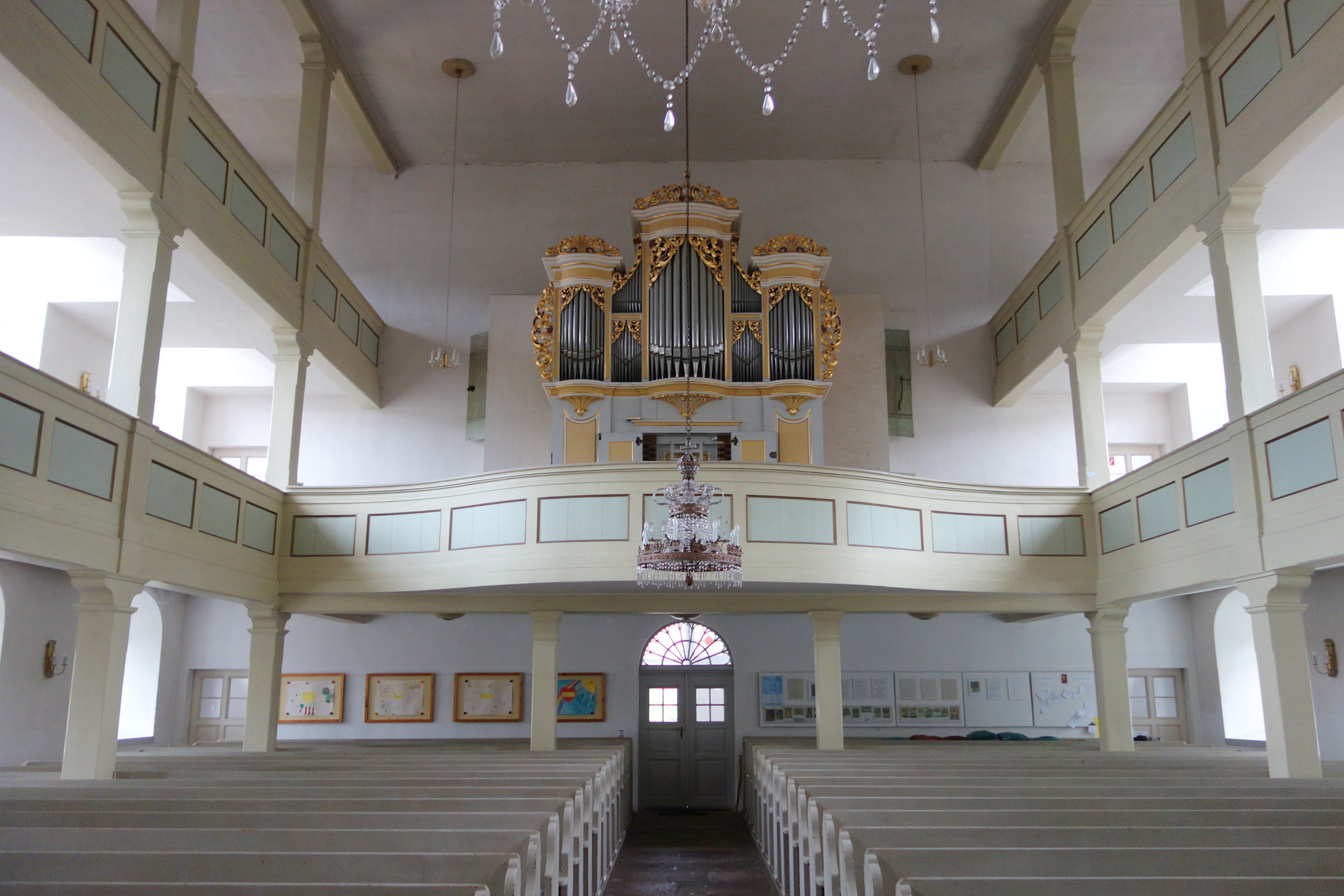 Orgel der Ev. Kirche Crostau, Sachsen, Deutschland